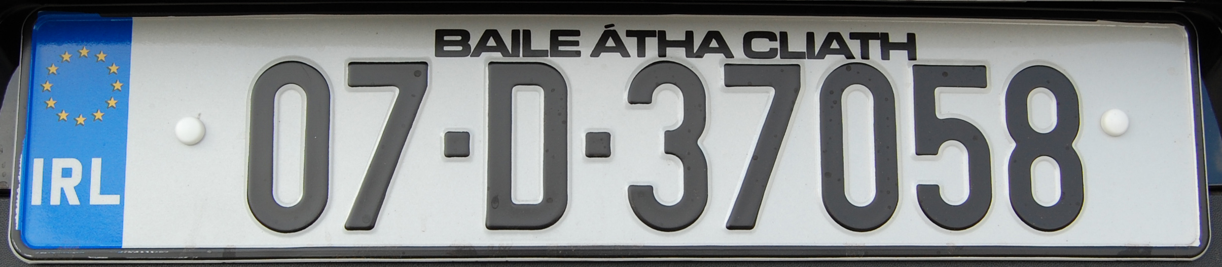 Placa de um carro de Dublin, Irlanda, modelo 2007